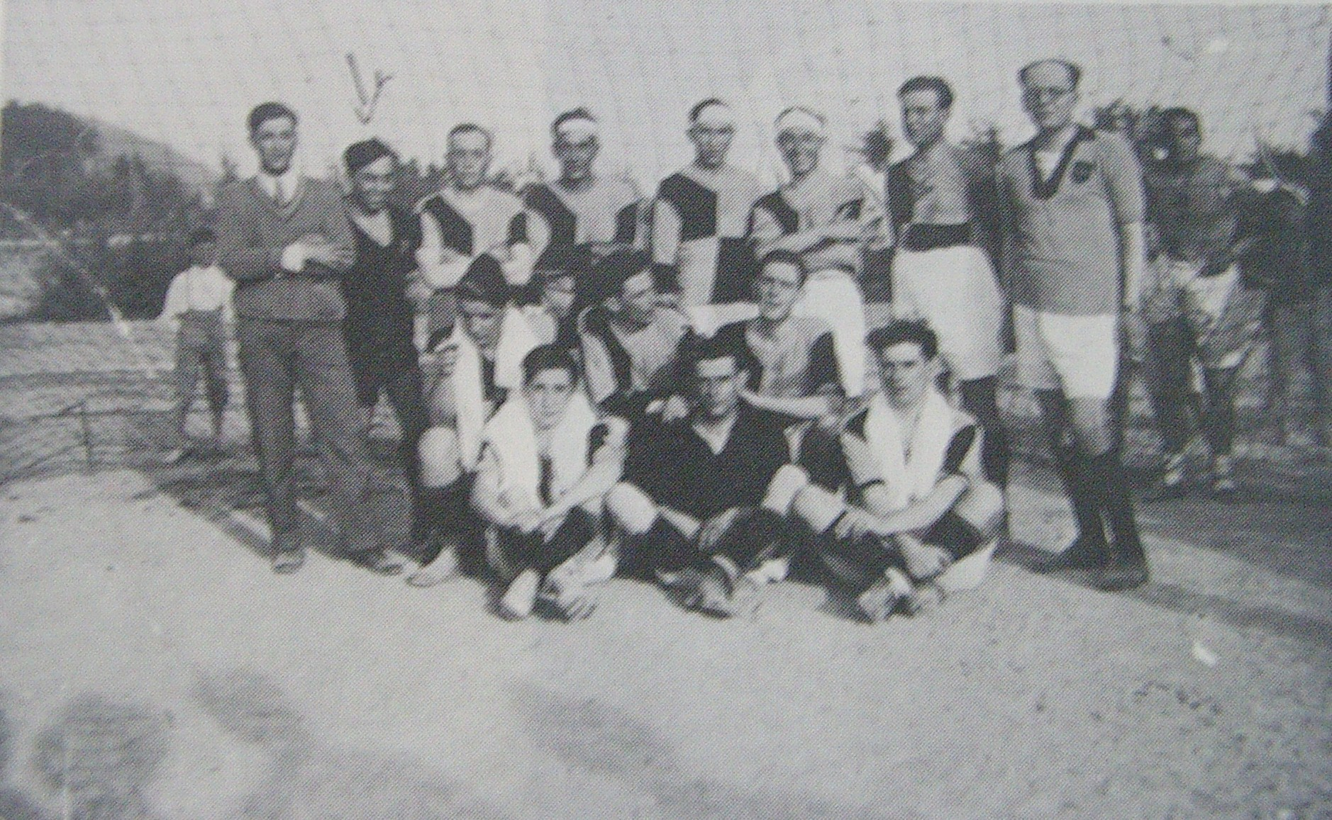 Time da Salernitana em 1929.